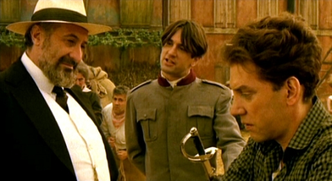 Screenshot del film Novecento (1976)